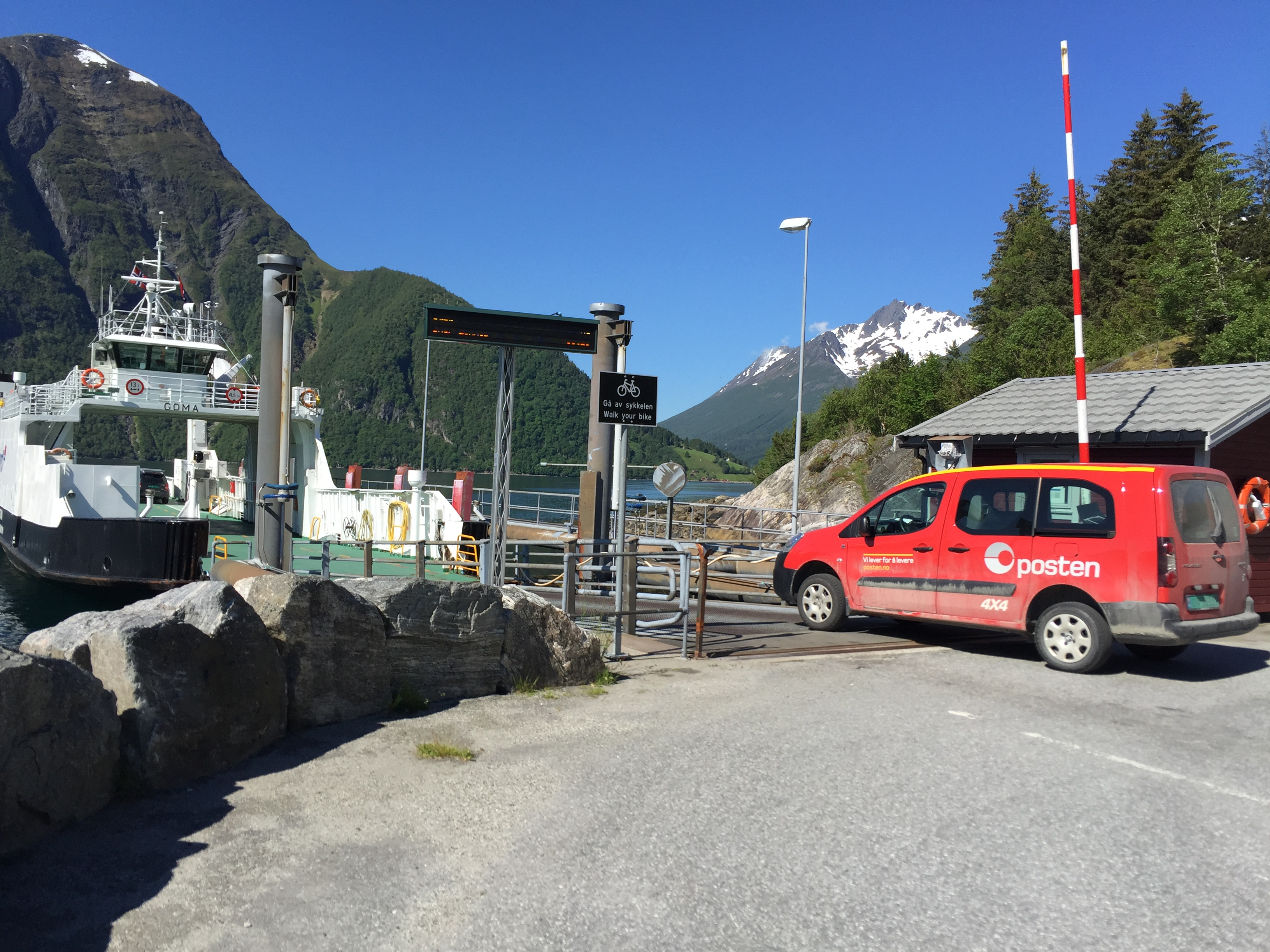 Ein Zustellerfahrzeug der Posten Norge befährt eine Fähre